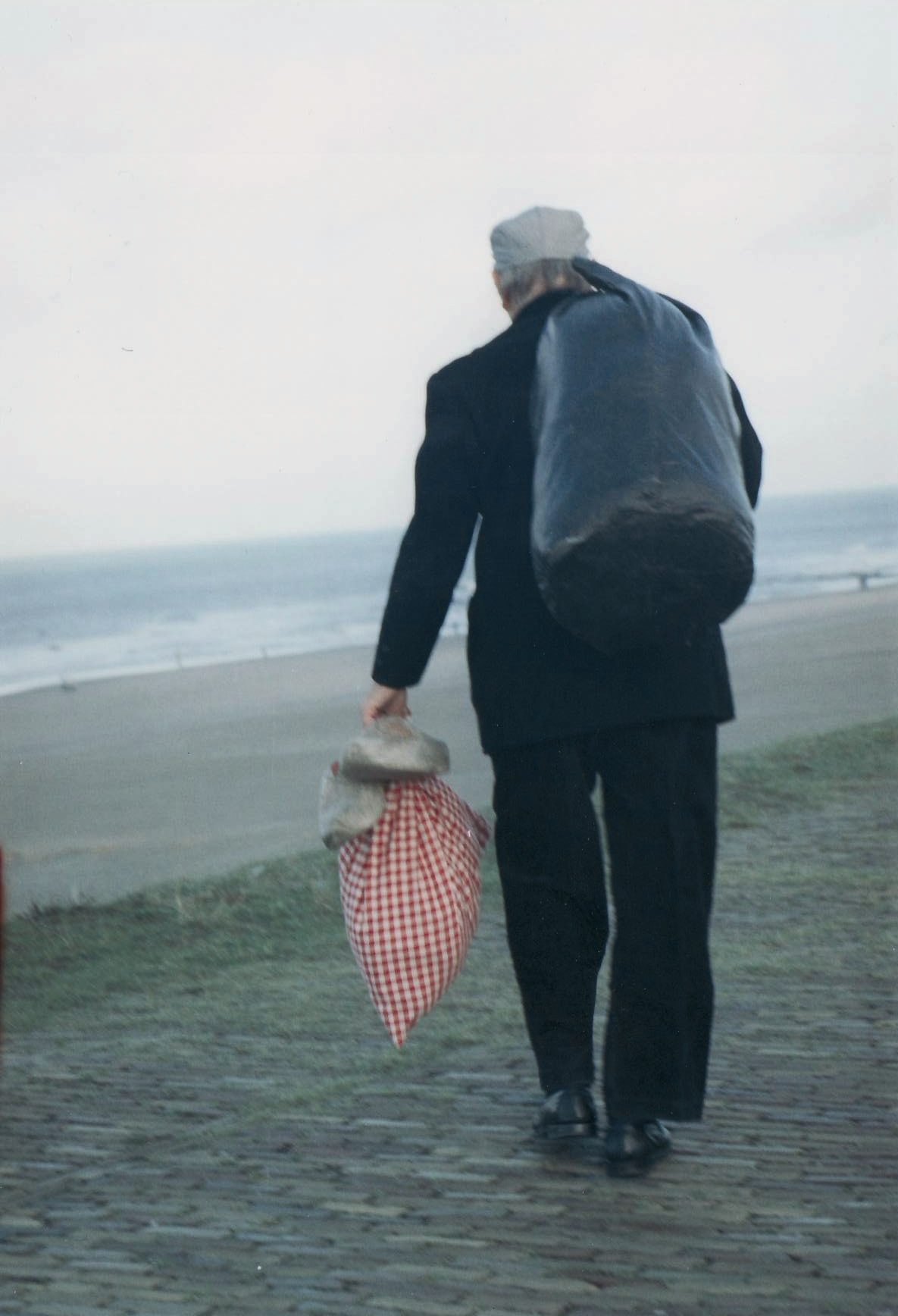 Bouweteelt